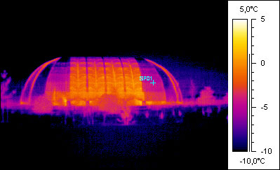 Thermographieaufnahme von Tropical Islands